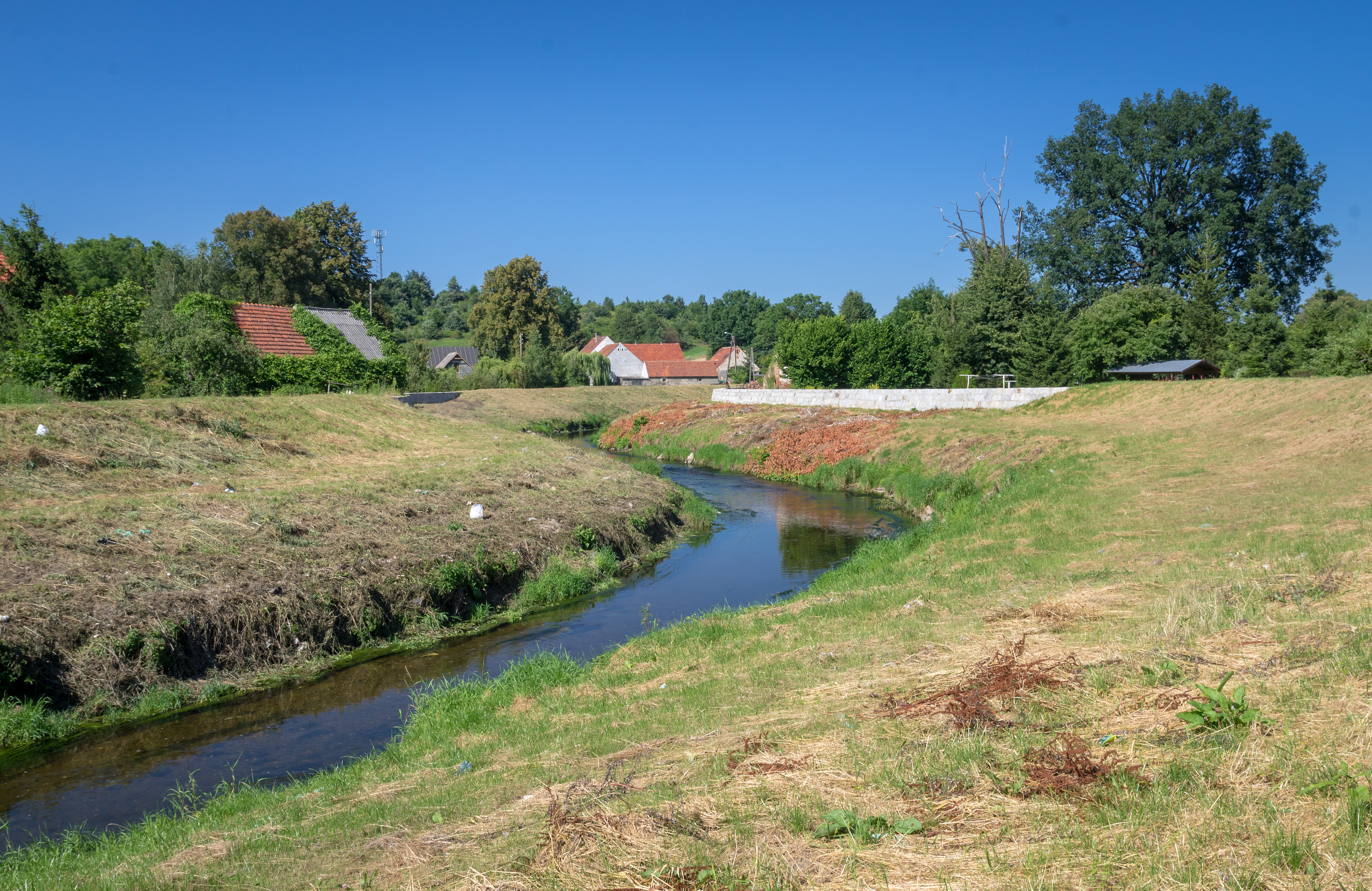 Mościsko Dzierżoniowskie, rz. Piława This photo of Lower Silesian Voivodeship was taken during Wikiexpedition 2013 set up by Wikimedia Polska Association.You can see all photographs in category Wikiekspedycja 2013.